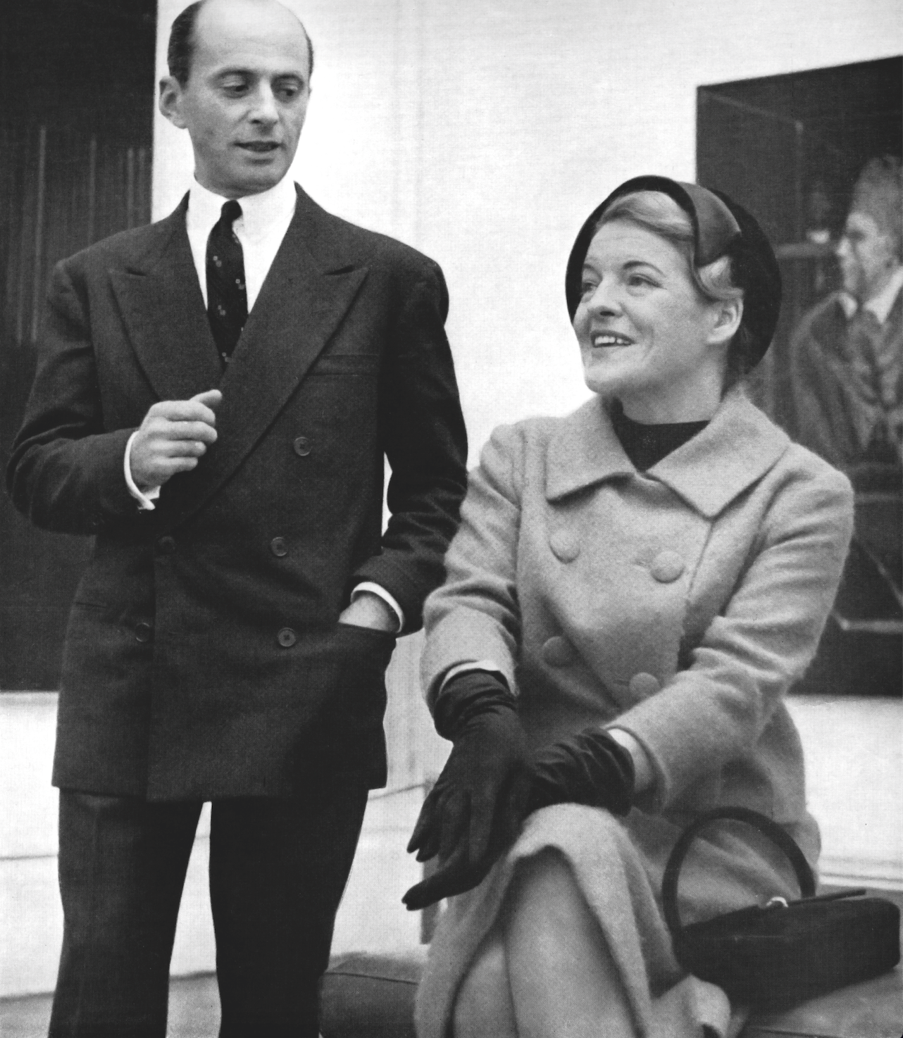 le couple présente sa collection à la Tate Gallery à Londres 1958